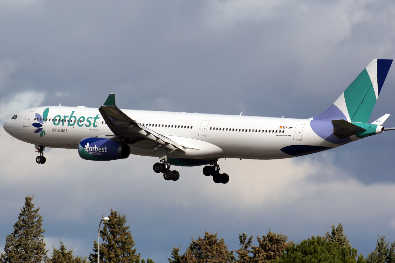 Madrid - Barajas (LEMD/MAD)